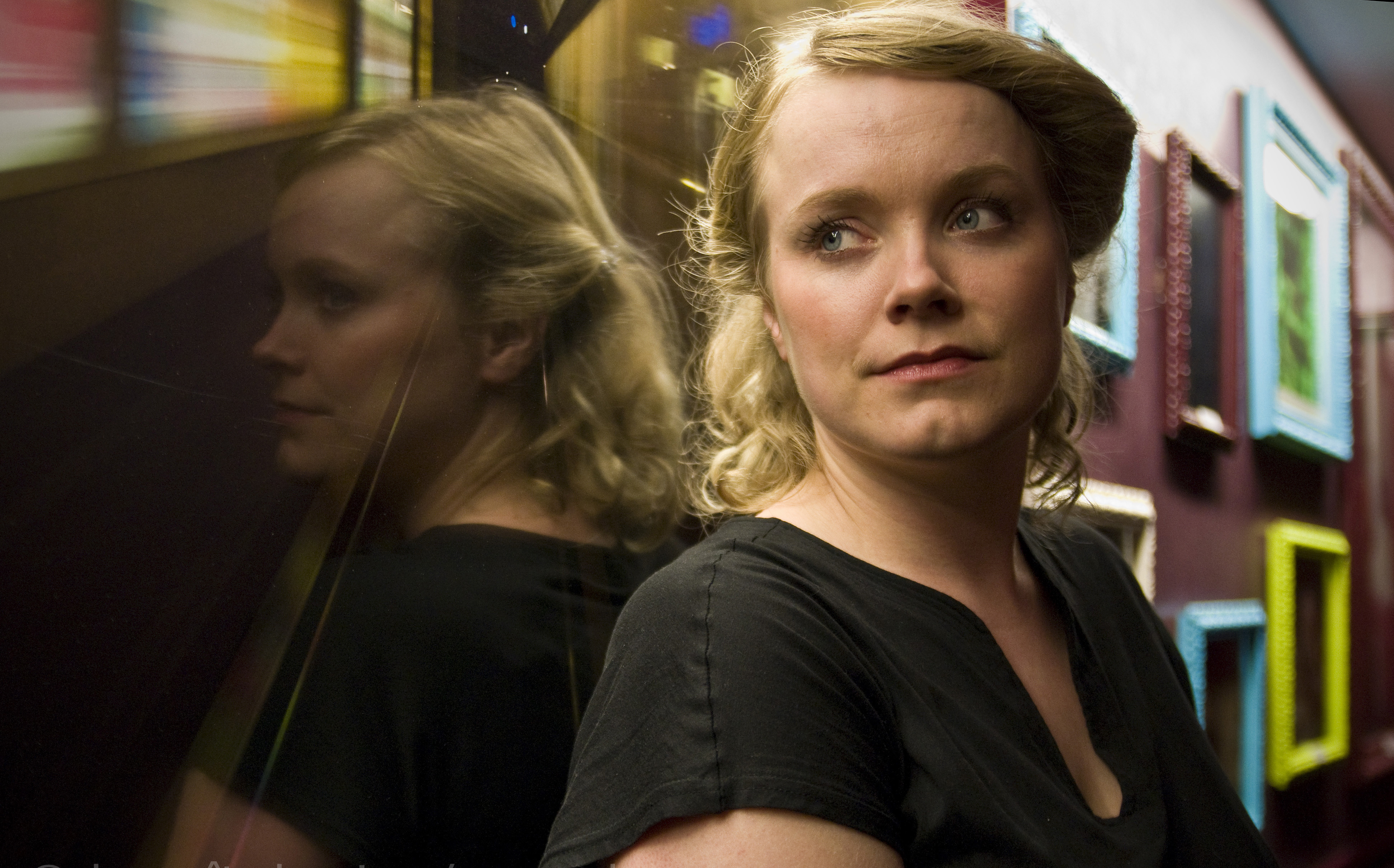 En interview sur Le Cargo